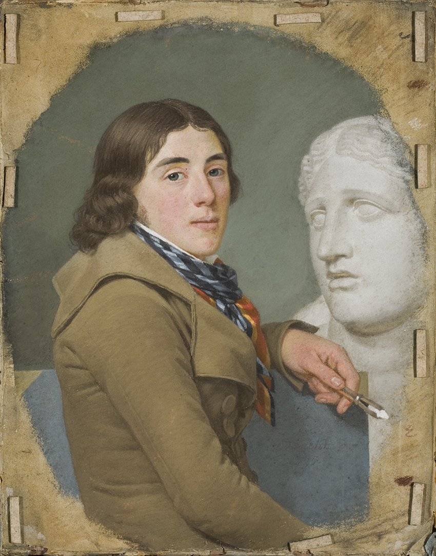 Portret van Albert Jakob Frans Gregorius (Joseph Octave van der Donckt, 1795); collection: Musea Brugge - Groeningemuseum